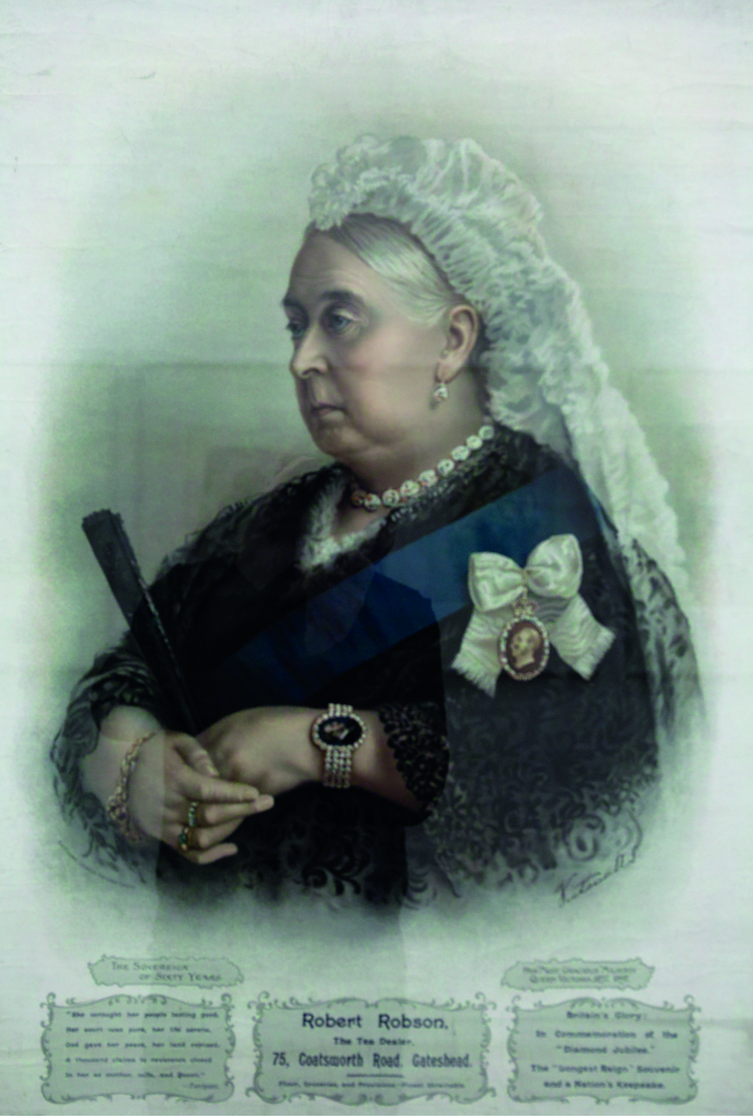 MKG: The Sovereign of Sixty Years - Her 'Most Gracious' Majesty Queen Victoria. gewidmet von Robert Robson, Teehändler in Gateshead. Druck: Alf Cooke. Queen's Printer. Chromolithografie, Leeds 1897. Museum für Kunst und Gewerbe, Hamburg.